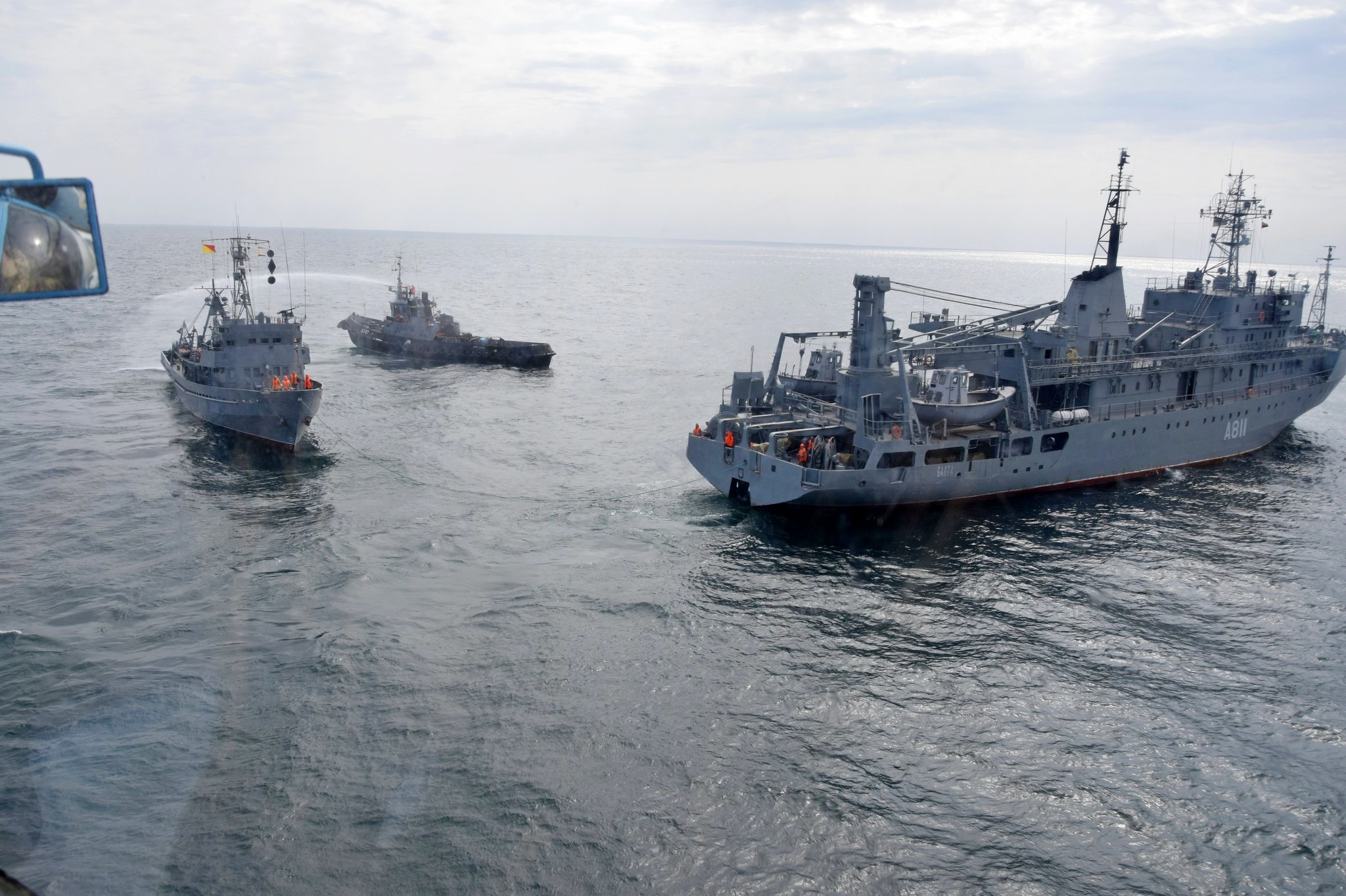 Навчання командування ВМС ЗС України «Шторм – 2018»: дії артилерії, авіації та інженерних підрозділів під час оборони морського узбережжя В рамках спільного командно-штабного навчання Командування Військово-Морських Сил ЗС України з іншими військовими формуваннями та правоохоронними органами “Шторм 18” було проведено операцію щодо оборони морського узбережжя. Окремий артилерійський дивізіон національних ВМС здійснив вогневе ураження морських цілей артилерійськими системами гаубичного типу Д-20. Інженерні підрозділи виконали завдання з облаштування протидесантних мінних загороджень та аерозольного маскування вогневих позицій, а морська авіація виконала бомбометання. Варто зазначити, що злагоджені дії задіяних військ (сил) показали налагоджену роботу командного пункту управління навчання та підвищення взаємосумісності з іншими органами управління. Прес-центр Командування ВМС ЗС України